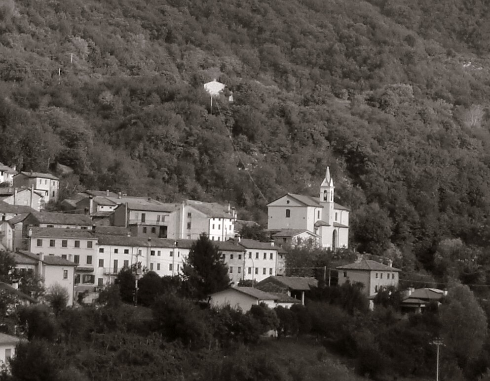 Montaner di Sarmede (Treviso): veduta della località Val, con l'antica chiesa id Santa Cecilia.